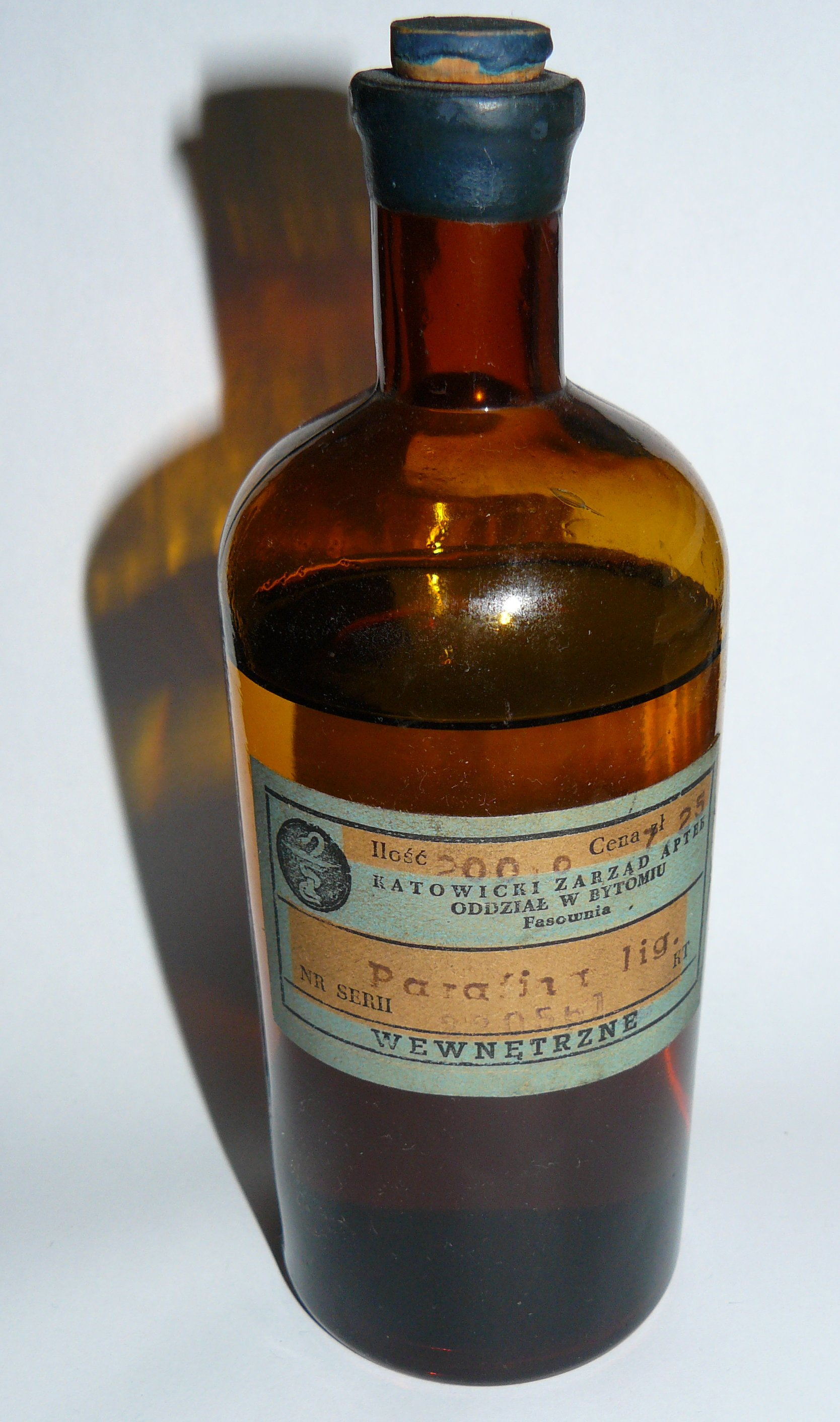 Parafina w butelce z ciemnego szkła